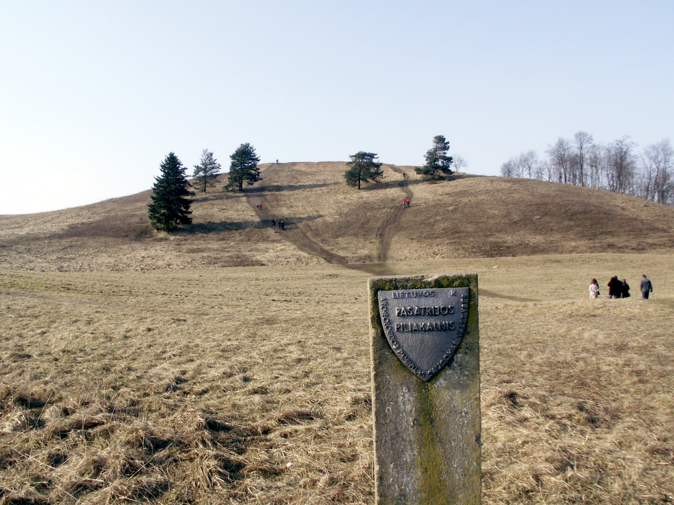 Pašatrijos piliakalnis, Telšių rajonas, Lietuva